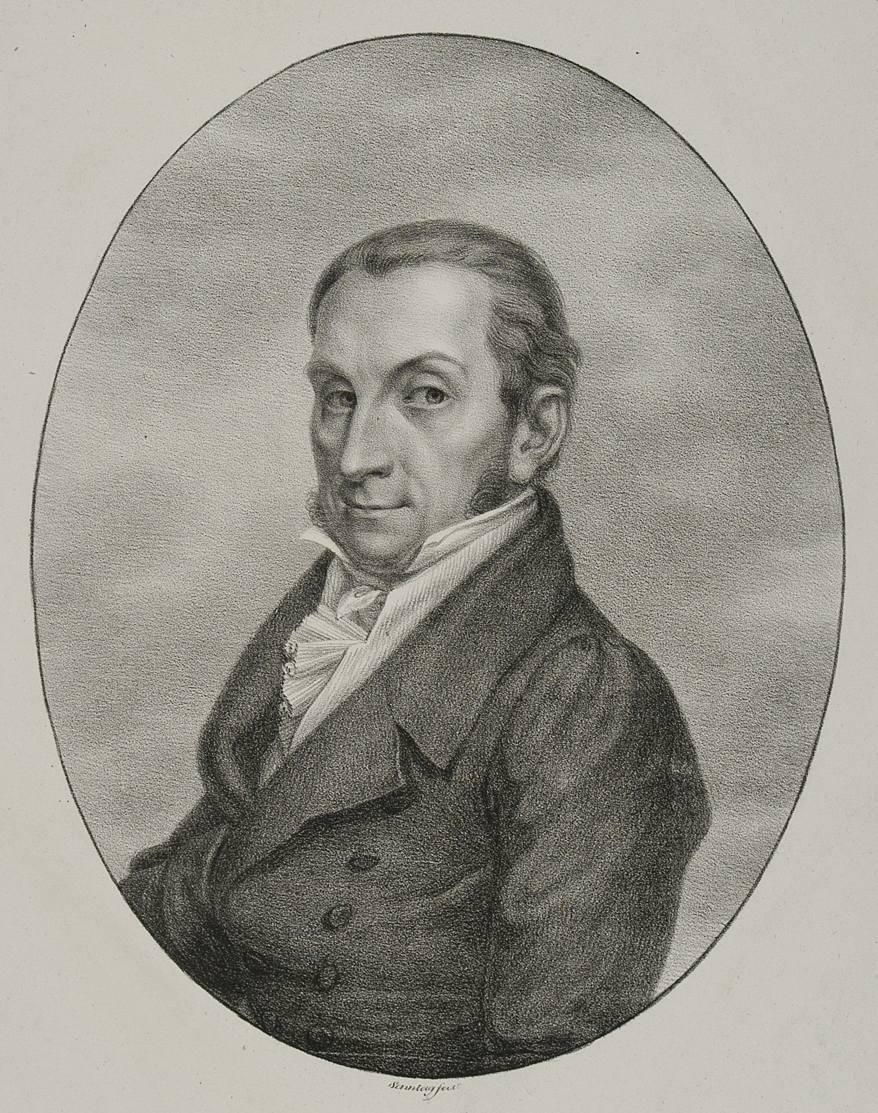 August Ferdynand Wolff